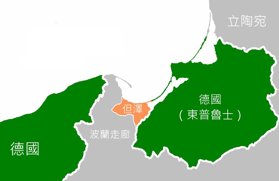 中文（台灣）: 波蘭走廊地圖，中文版